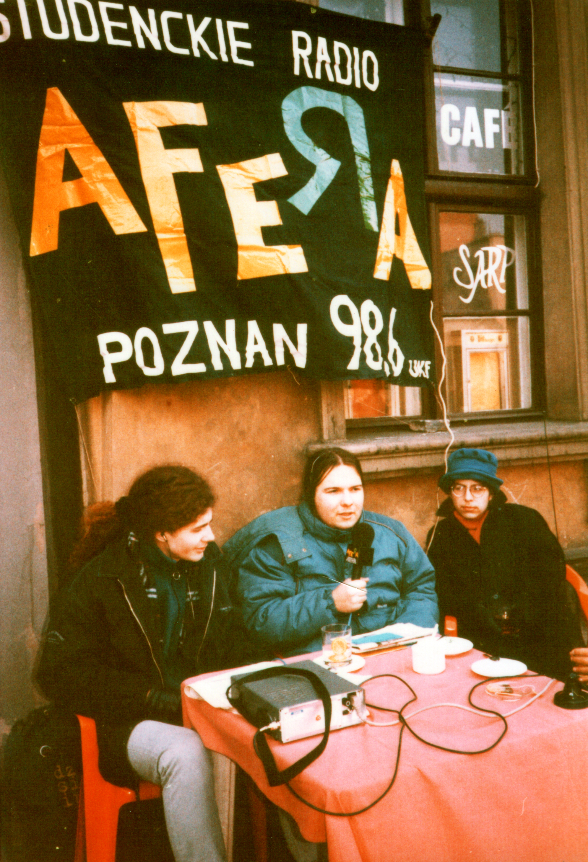 Plenerowe studio Radia Afera. Stary Rynek Poznan.